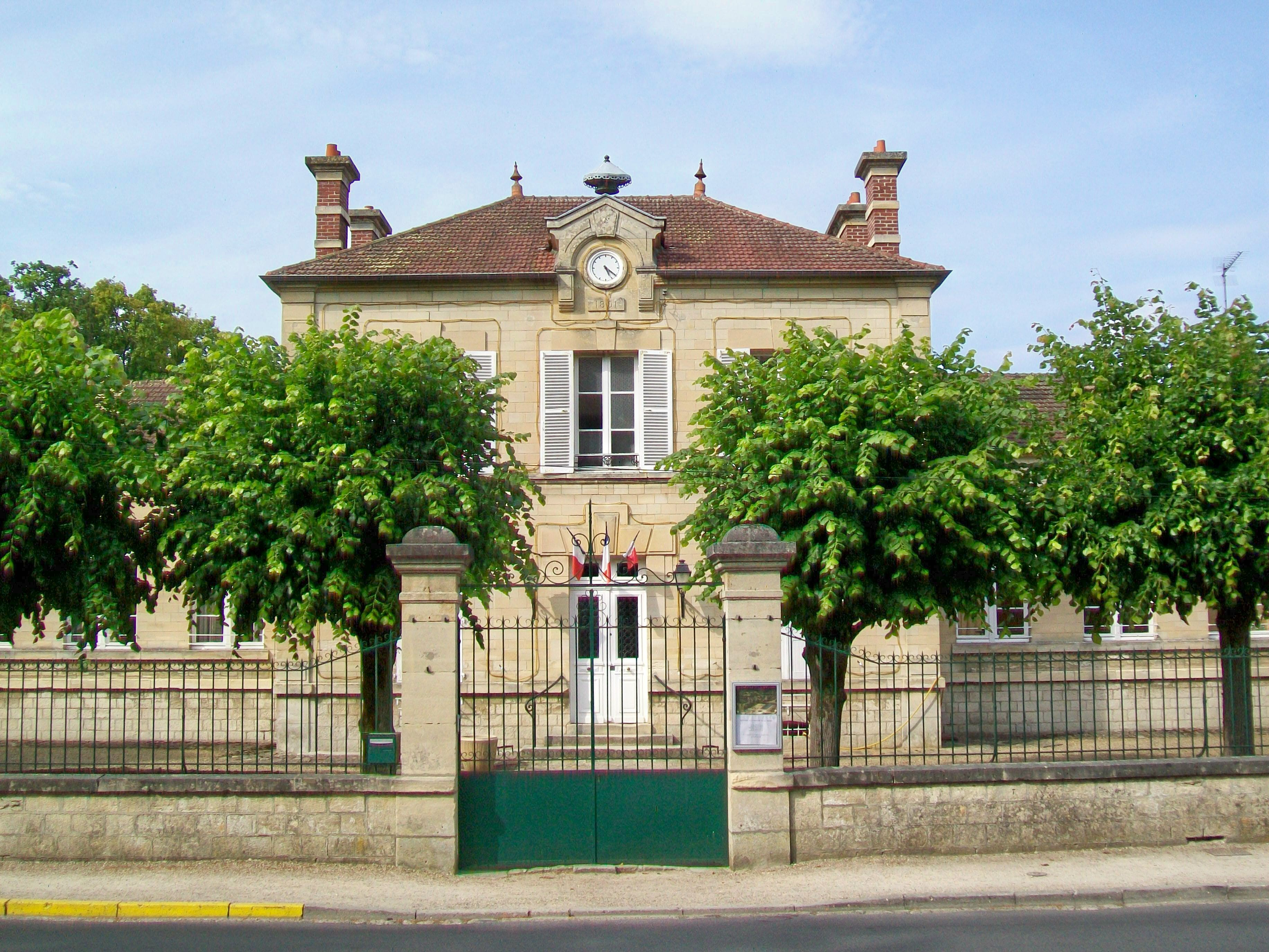 La mairie, situé entre les deux villages historiques dans le quartier du bois de Lude, près du point de vue sur le parc de Chantilly.